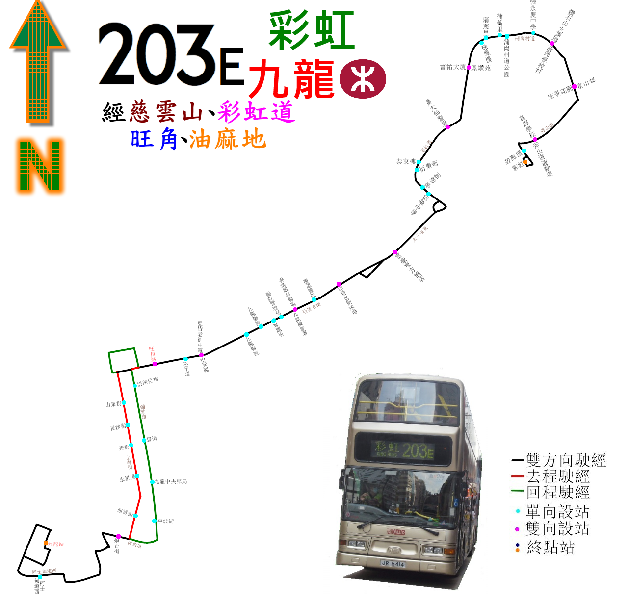 中文（香港）: 九巴203E線的走線圖